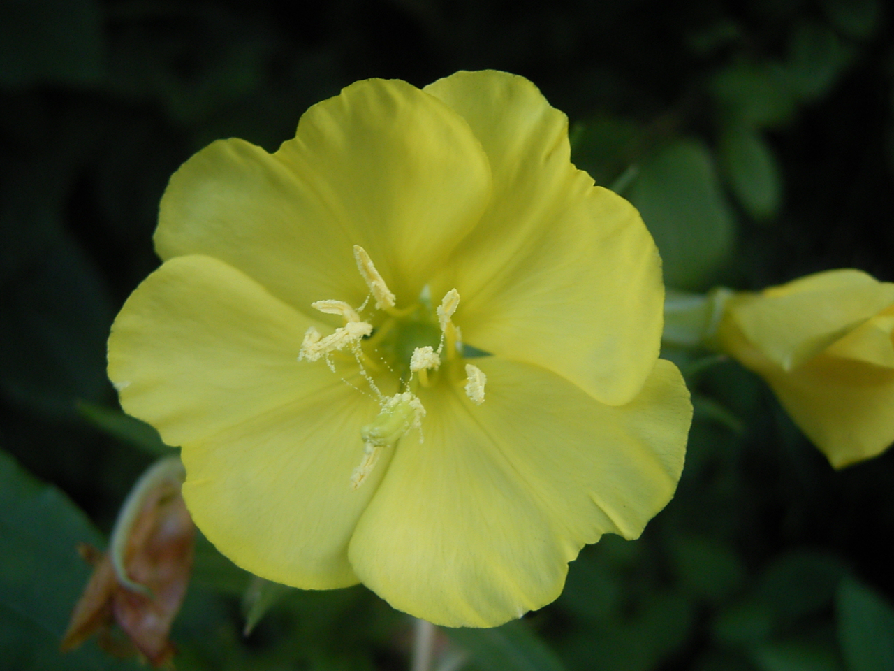 Deze foto toont de bloem van de Middelste teunisbloem. Ik nam de foto op 5 juli 2005 bij Hardenberg. This photo shows the flower of oenothera biennis. I took this pic on July 5, 2005, near hardenberg, Netherlands